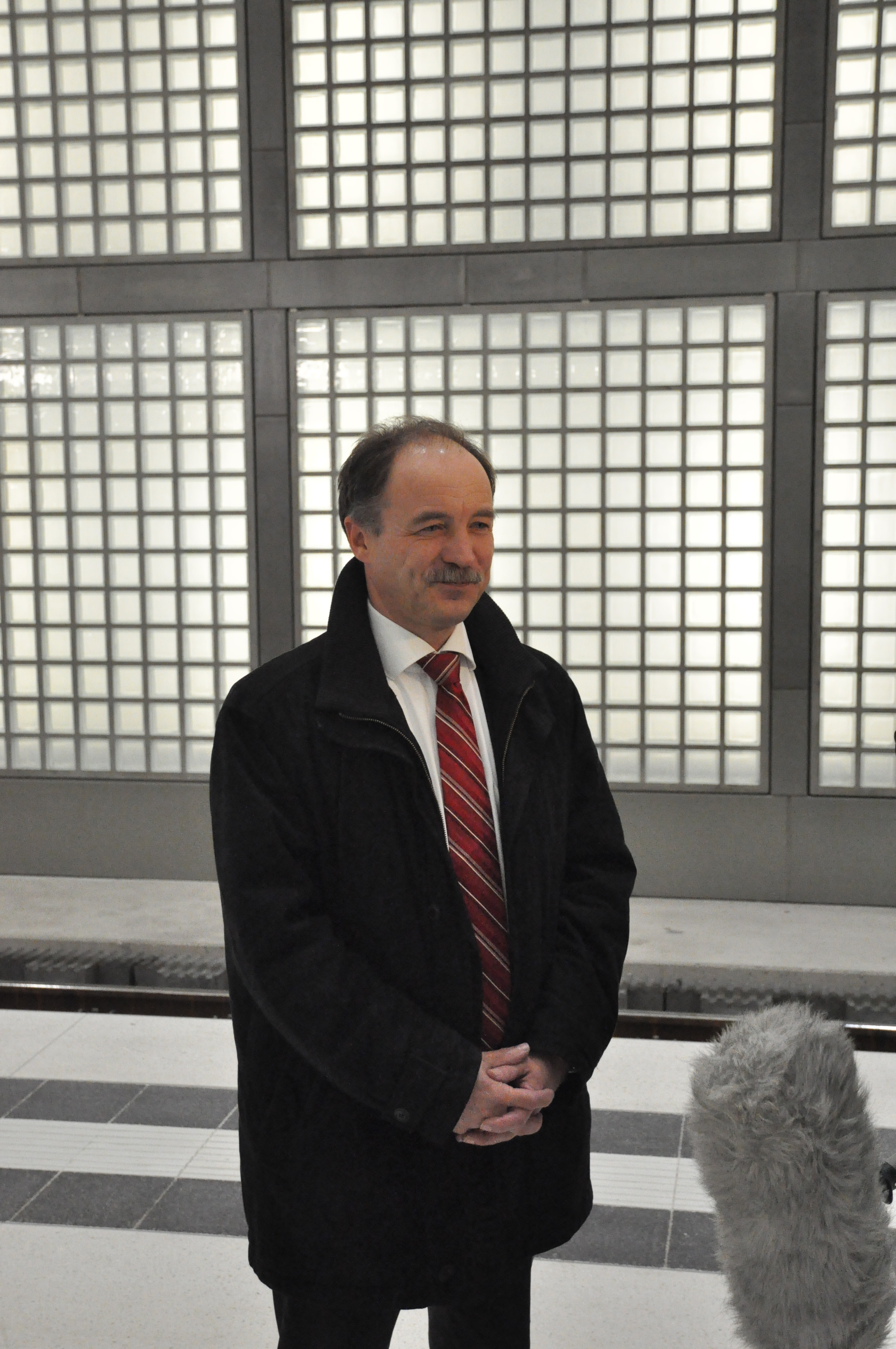 Interview mit Sven Morlok (sächsischer Staatsminister für Wirtschaft, Arbeit und Verkehr) in der Station W.-Leuschner-Platz im Leipziger City-Tunnel.